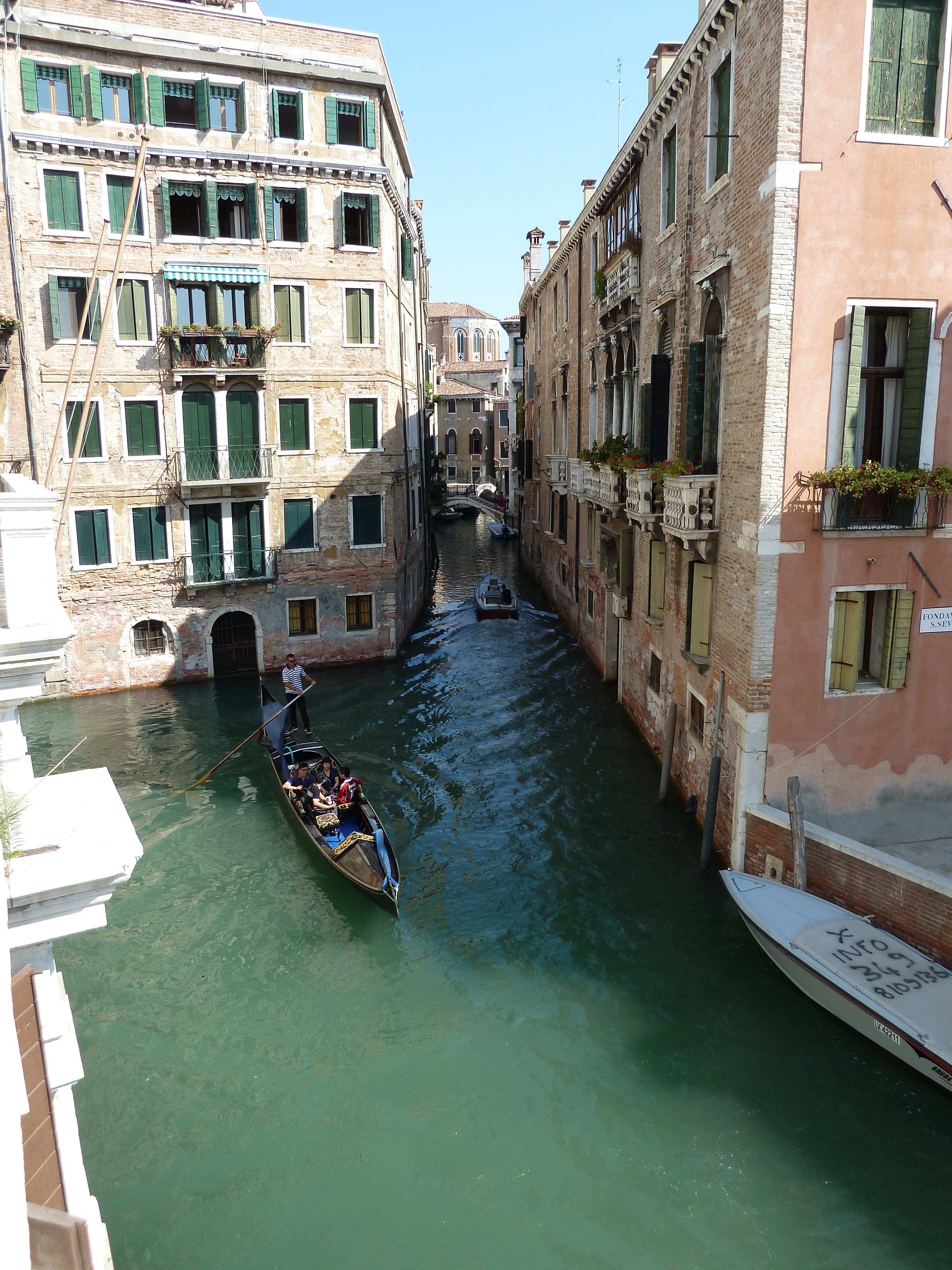 Rio s severo verso nord